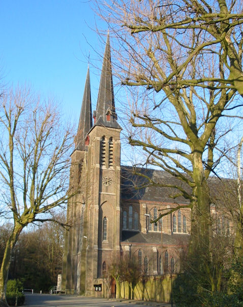 De Basiliek van Oostakker-Lourdes. Eigen werk. categorie:afbeelding Gent